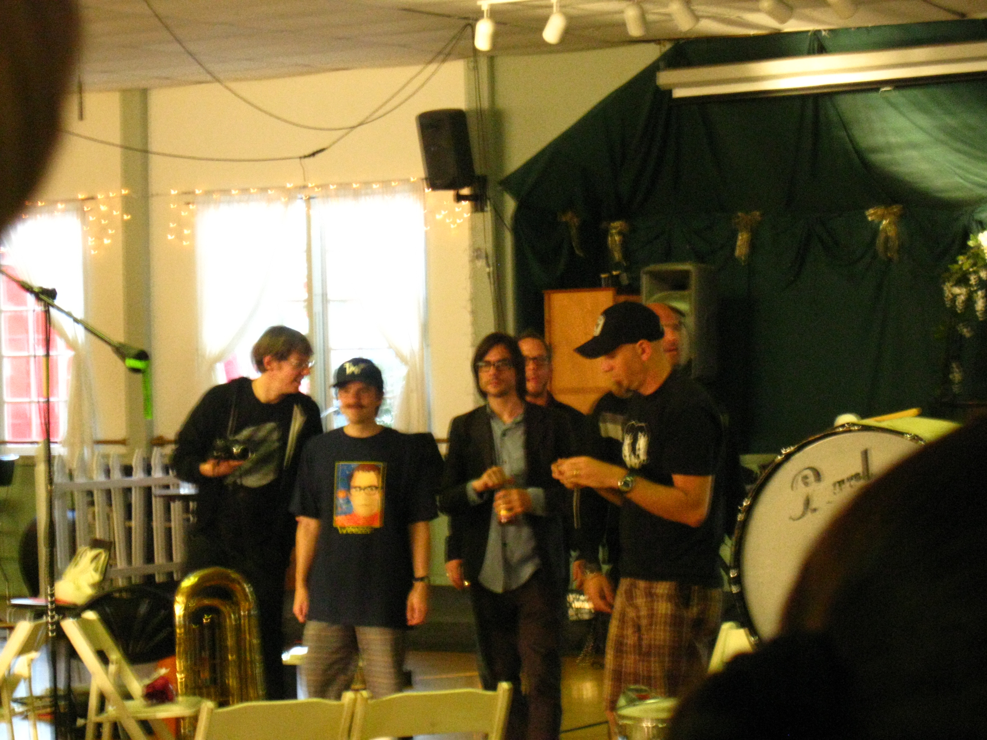 Weezer